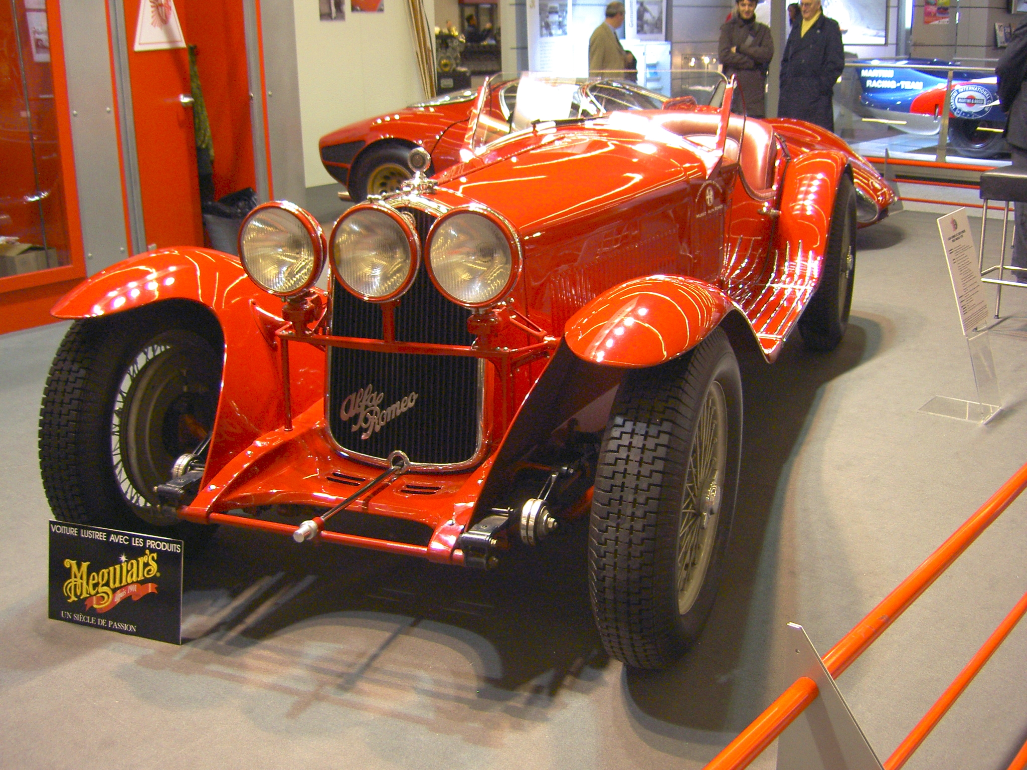 Alfa_Romeo Spider 8C 2300 (Mille Miglia 1932).